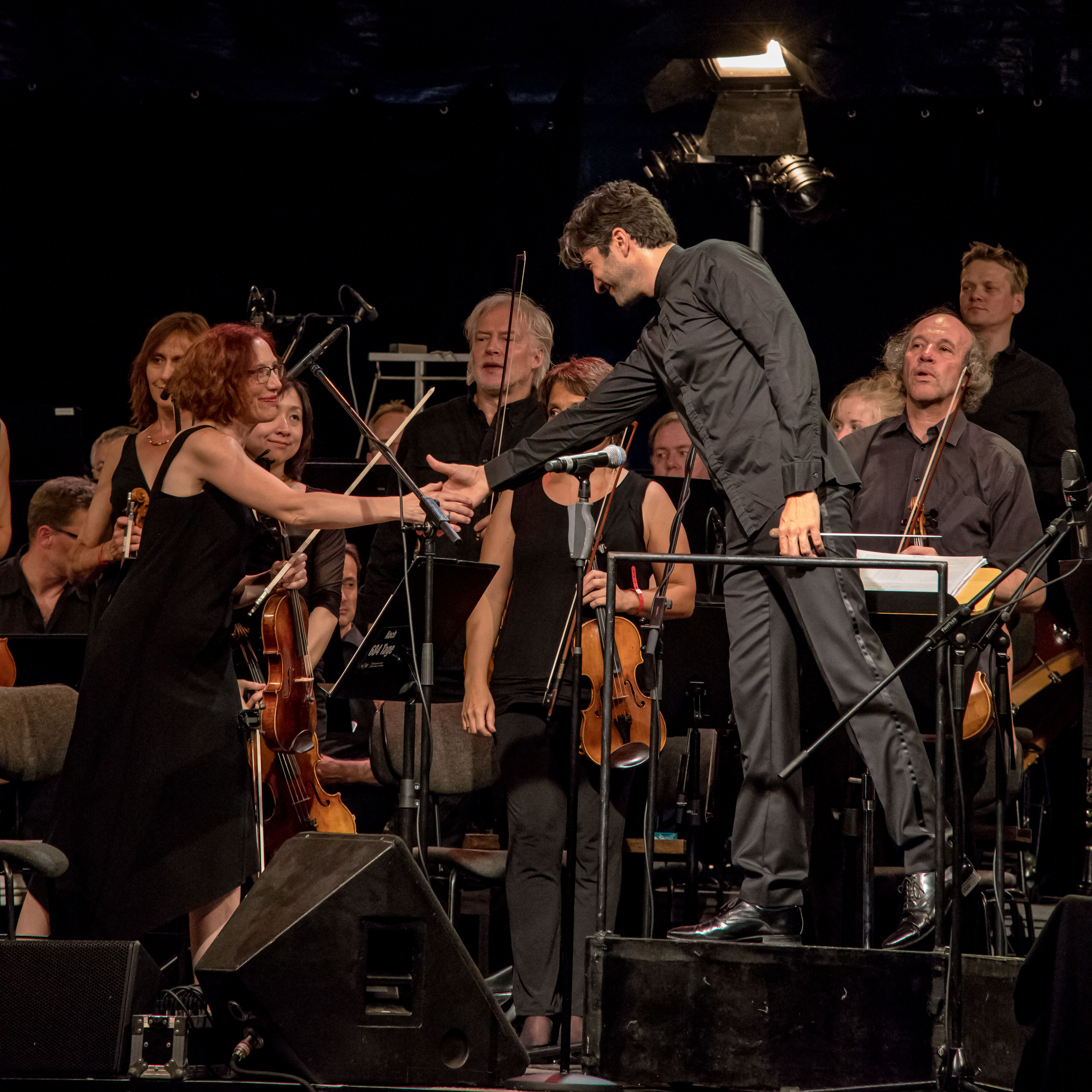 Bilder vom Zelt Musik Festival 2016 in Freiburg im Breisgau Die Gala